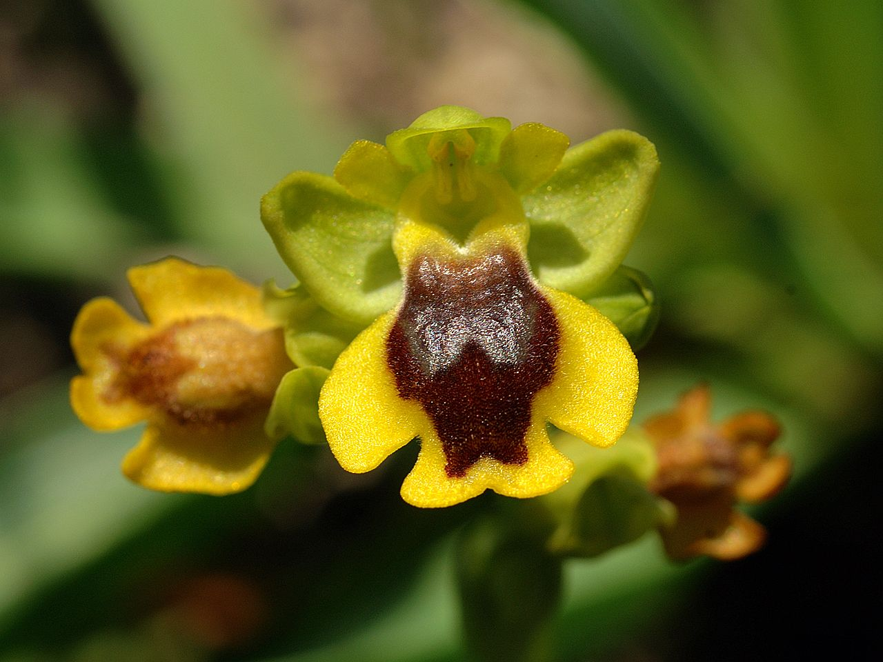 Ophrys phryganae - single flower